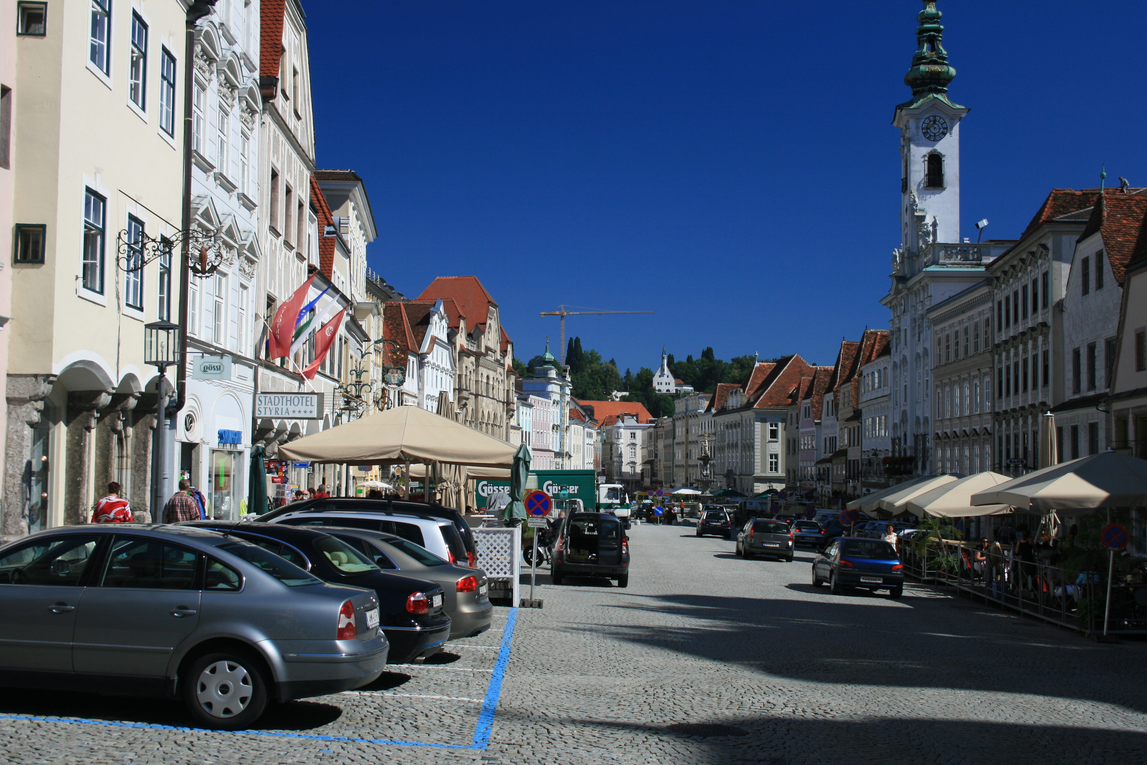 Der Hauptplatz der oberösterreichischen Stadt Steyr.